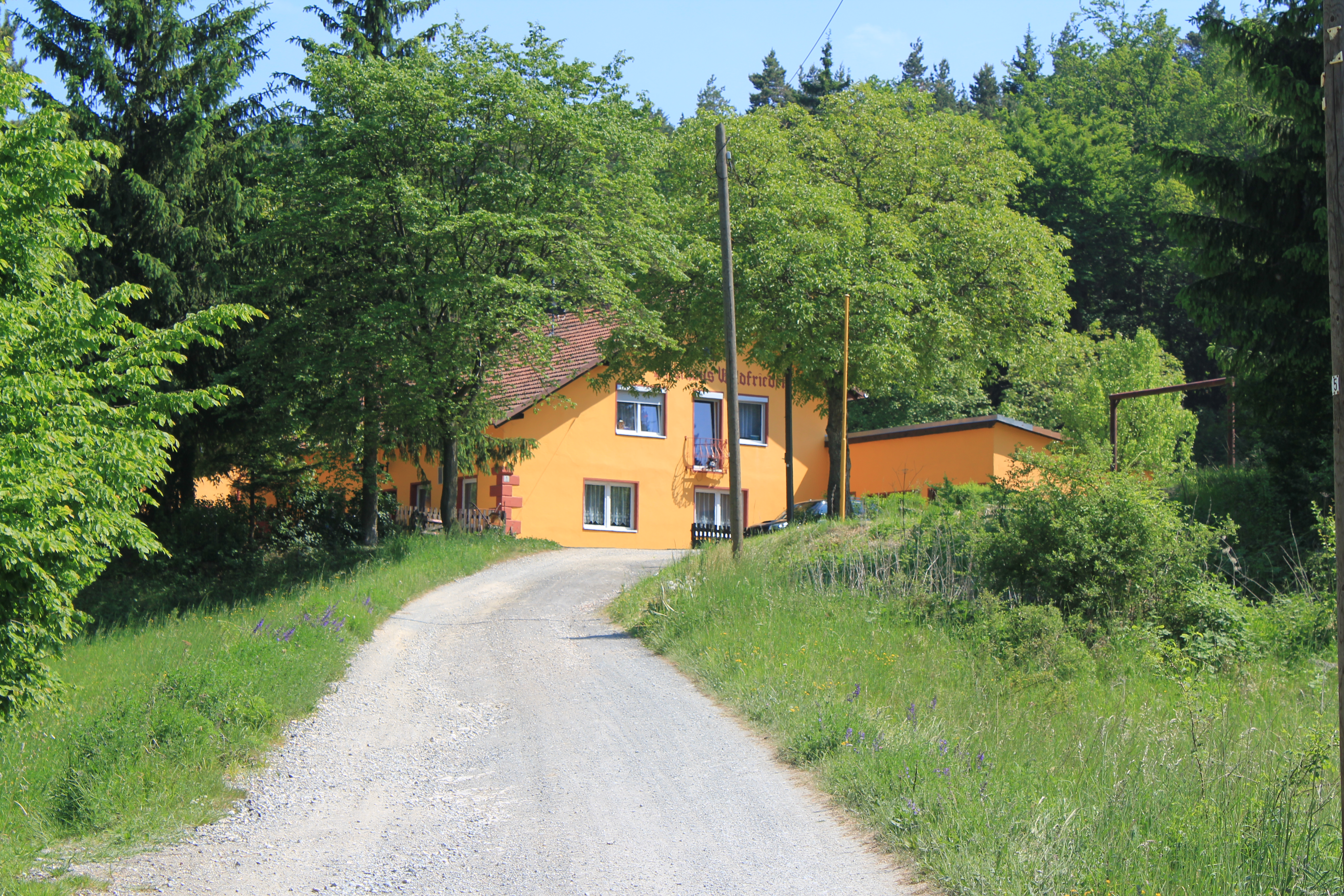 Das Gasthaus Waldfrieden, das die Einöde Kordigast (Altenkunstadt) darstellt.